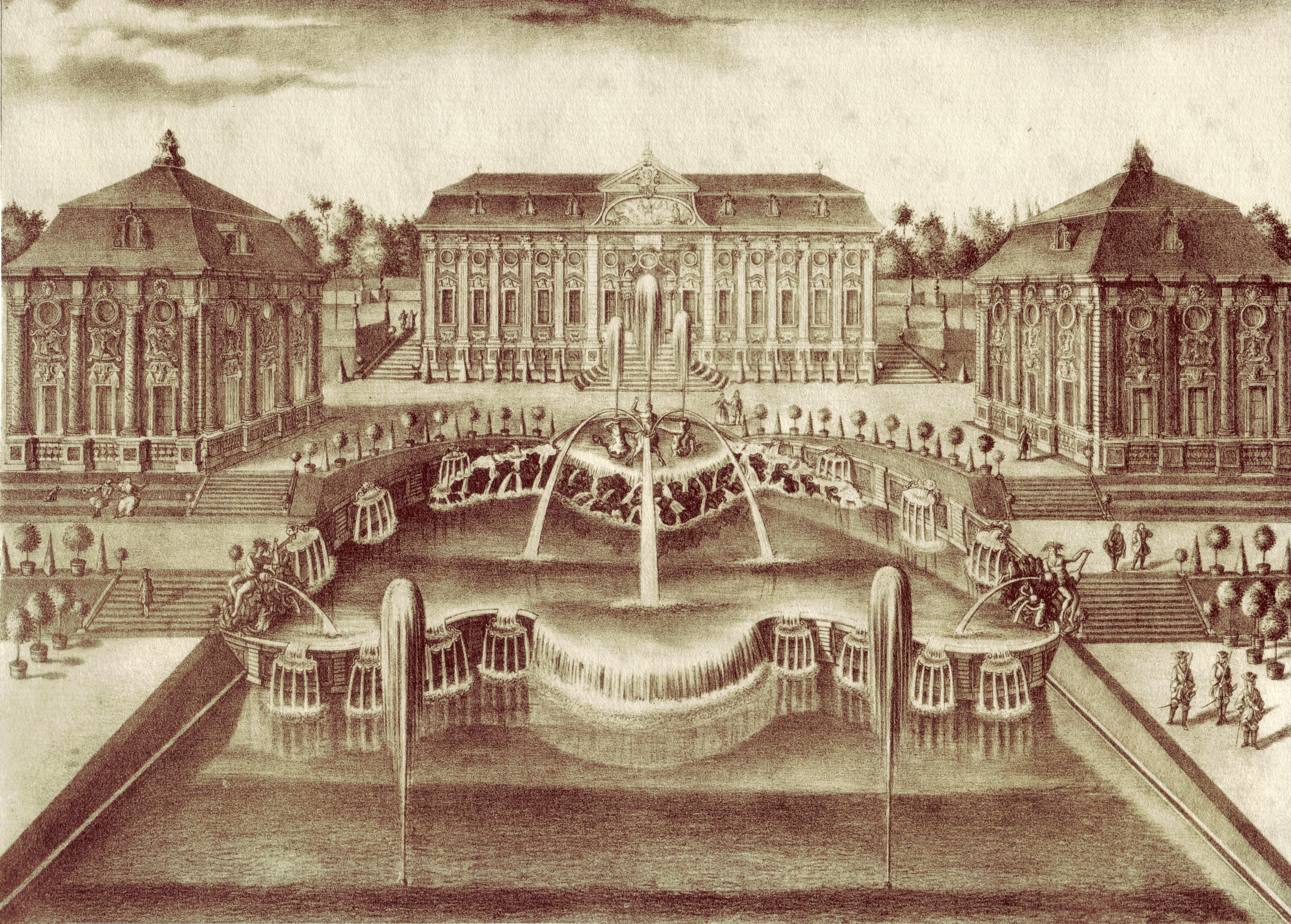 Die Orangerie und die wasserreiche Caskade in der ehemaligen churfürstlichen Favorite geziert mit allegorischen Figuren. Wegen der bevorstehenden Belagerung durch die Franzosen im Jahre 1793 zerstört und dem Boden gleich gemacht.